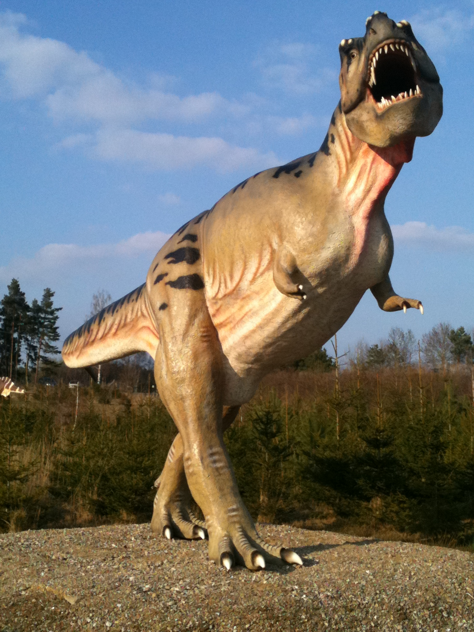 Dinosaur sculpture, Germany